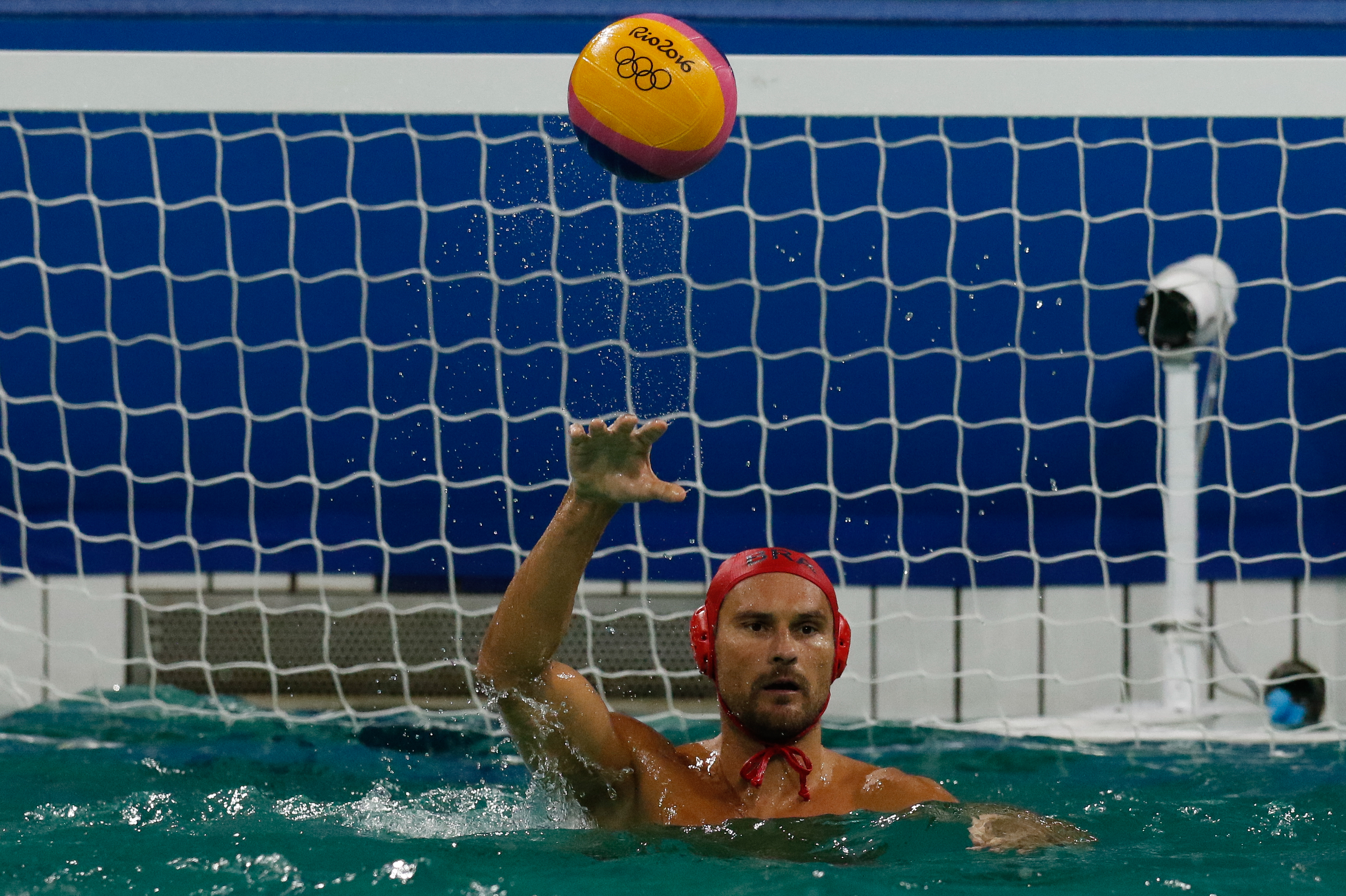 Seleção masculina brasileira de polo aquático vence a da Sérvia por 6 a 5 nos Jogos Olímpicos Rio 2016 no Parque Aquático Maria Lenk (Fernando Frazão/Agência Brasil)